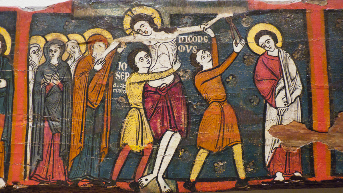 Barcelona Romanico 781 23 de julio de 2011